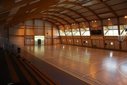 photo prise par Mougins danse sportive Salle du Font de l'Orme